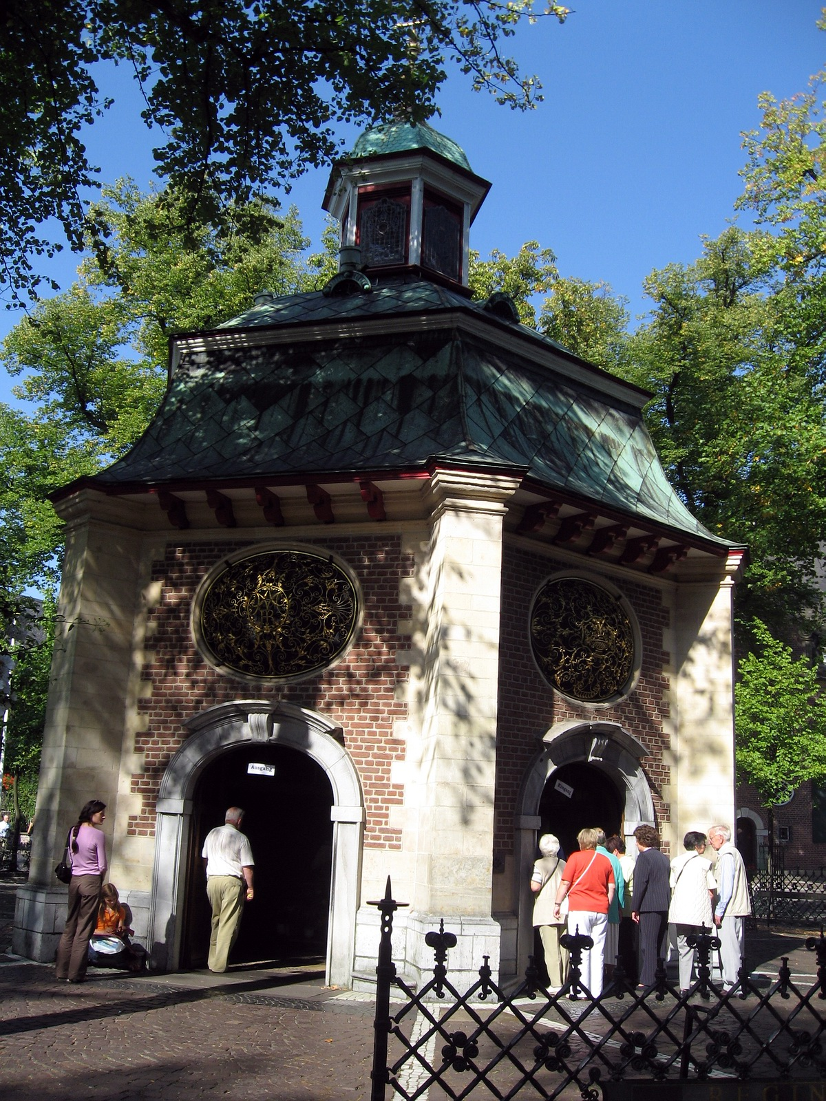 Kevelaer, Gnadenkapelle, Außenansicht